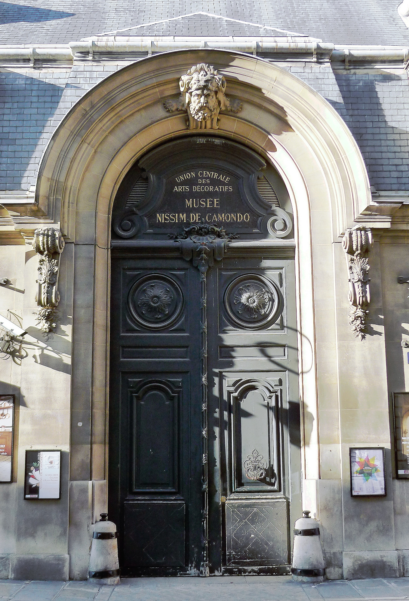 Rue de Monceau (n°63 musée Nissim de Camondo ; porte d'entrée) - Paris VIII